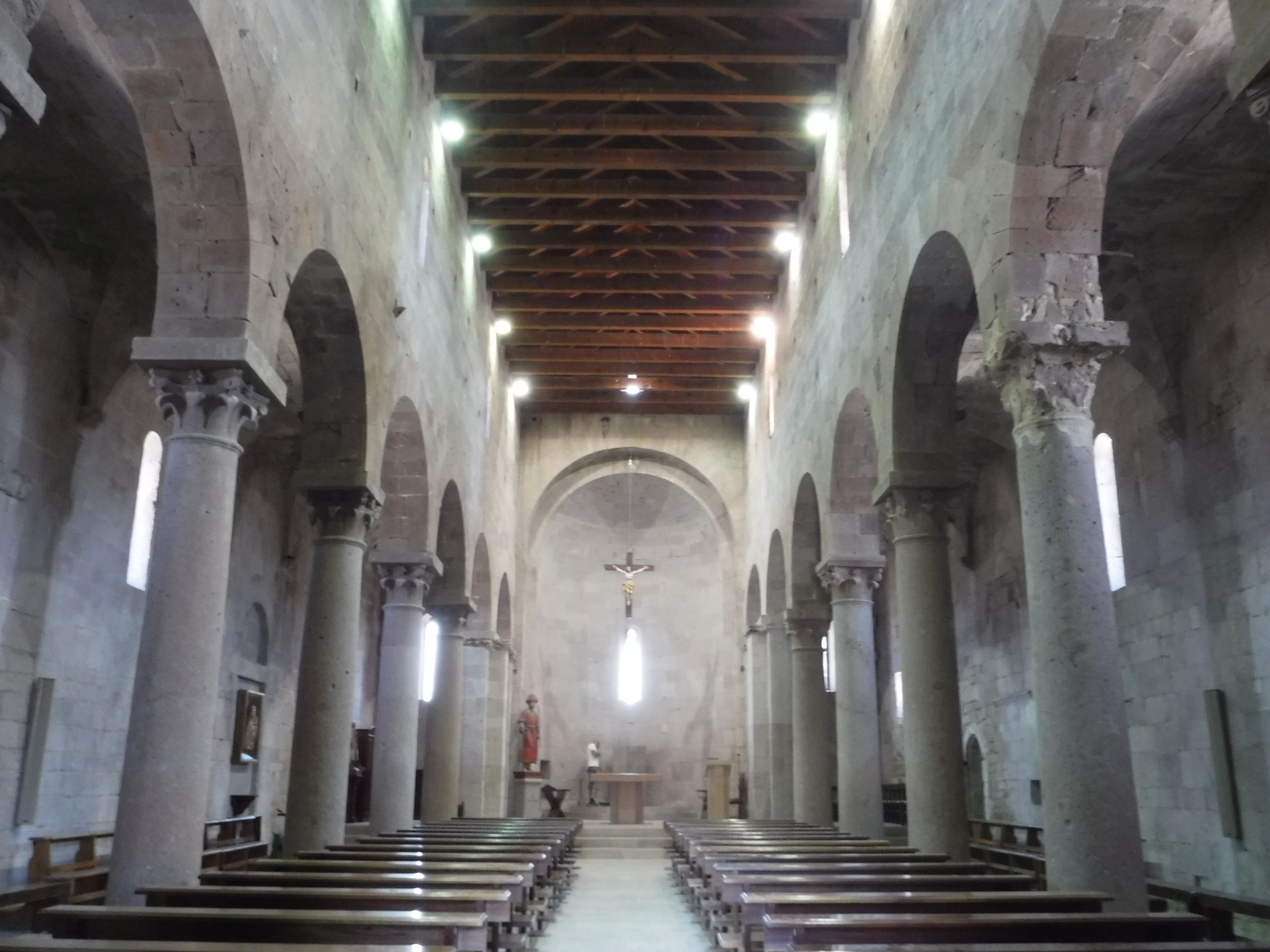 Sant'Antioco di Bisarcio, Interior